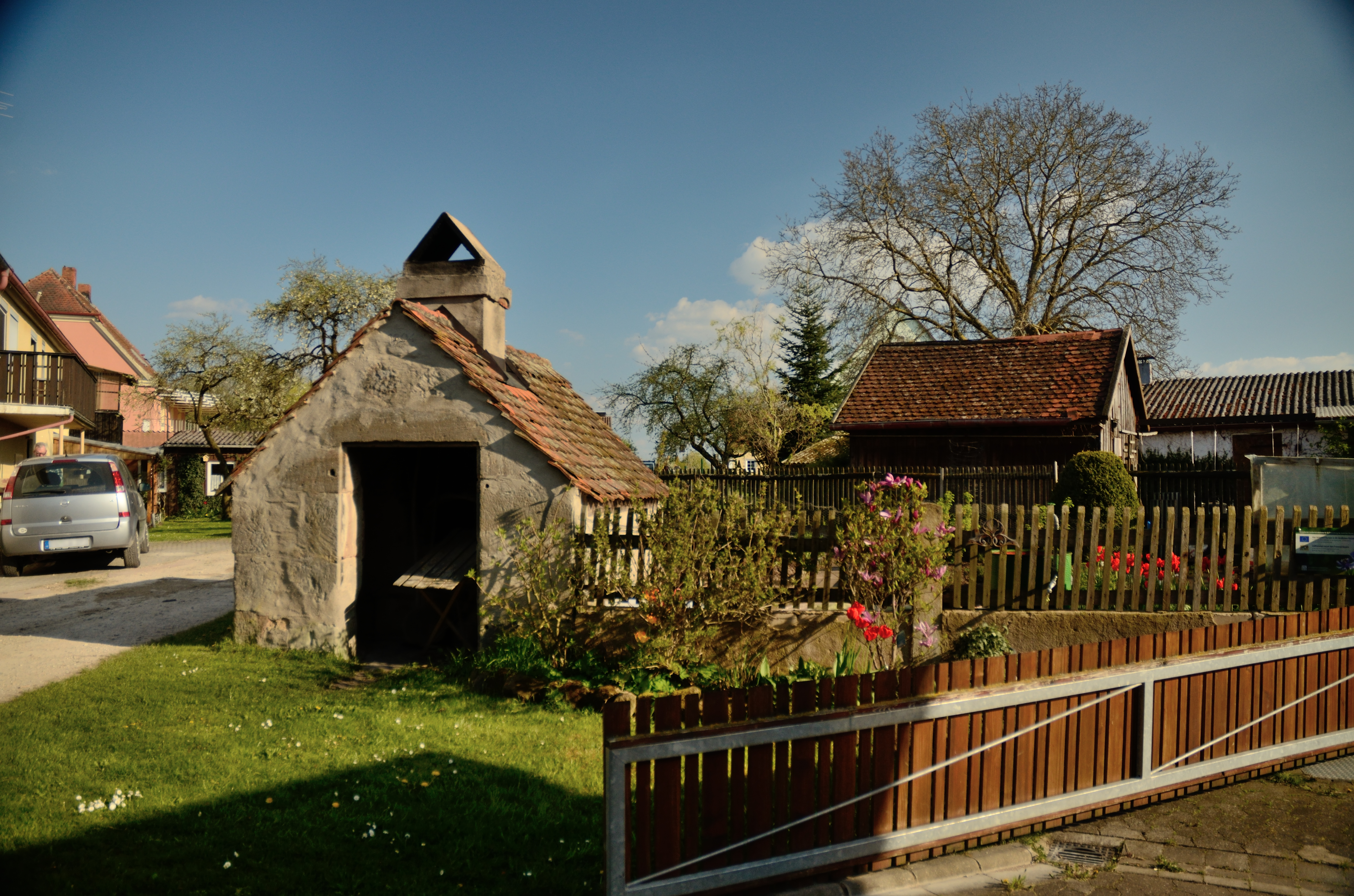 Neuhöflein, Backhaus